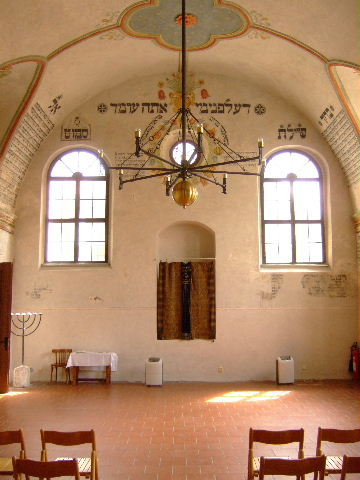 Třebíč: Synagoge (2009)